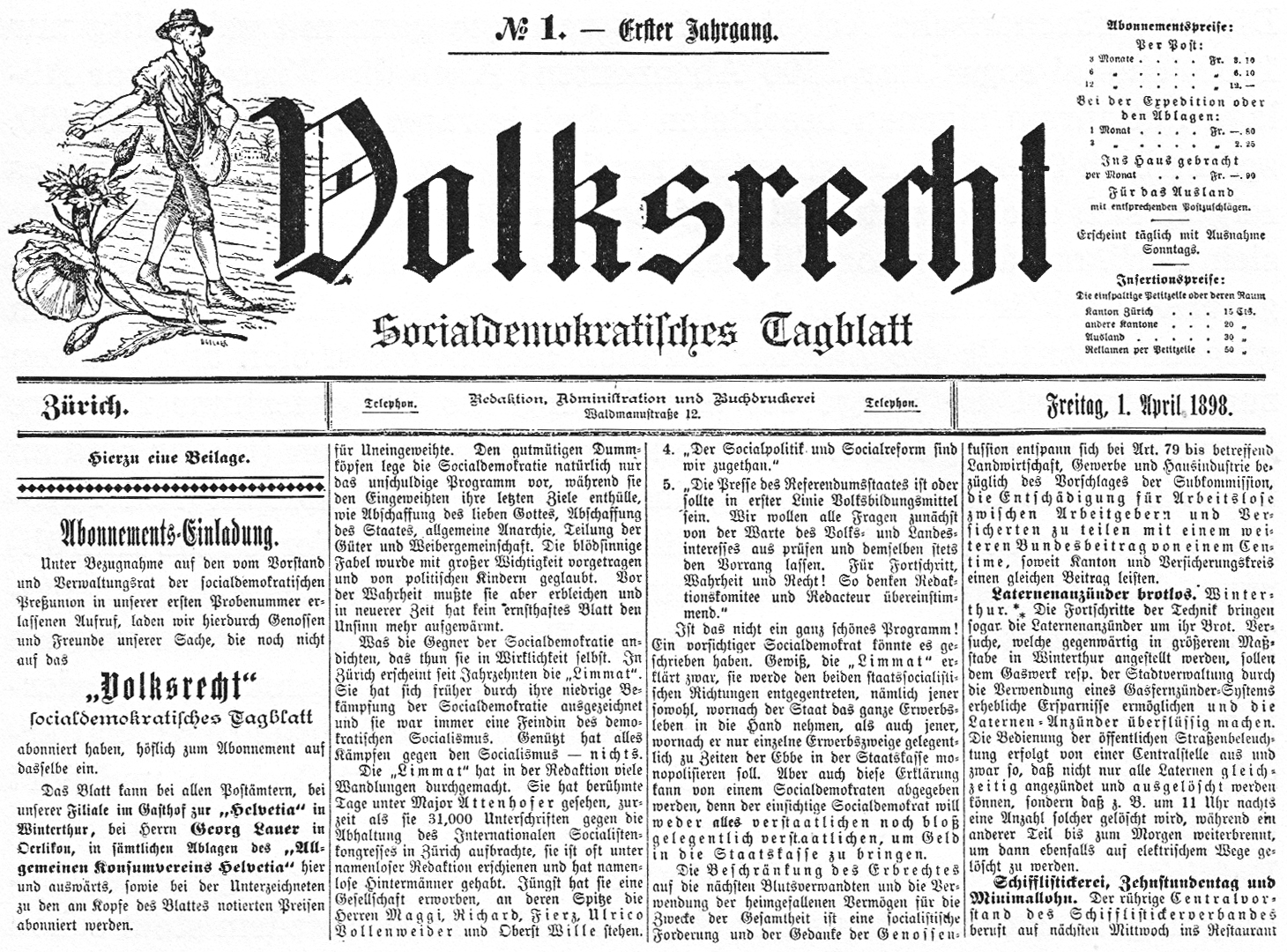 Erste Ausgabe der Zürcher Zeitung "Volksrecht", ein der Sozialdemokratischen Partei nahestendes Tagblatt.